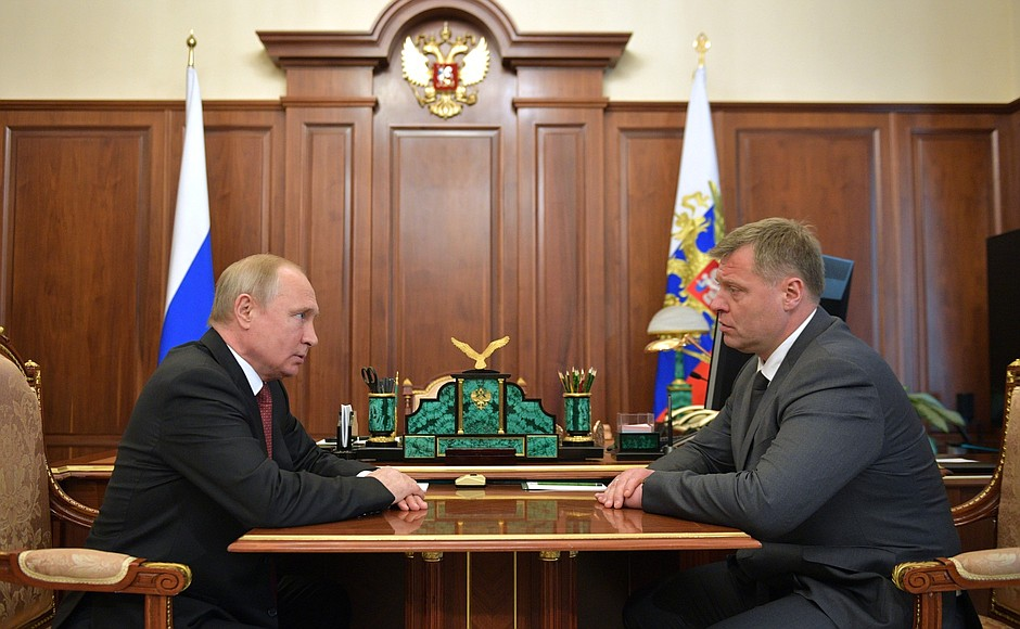 Владимир Путин провёл рабочую встречу с Игорем Бабушкиным, в ходе которой сообщил о своём решении назначить его временно исполняющим обязанности губернатора Астраханской области.